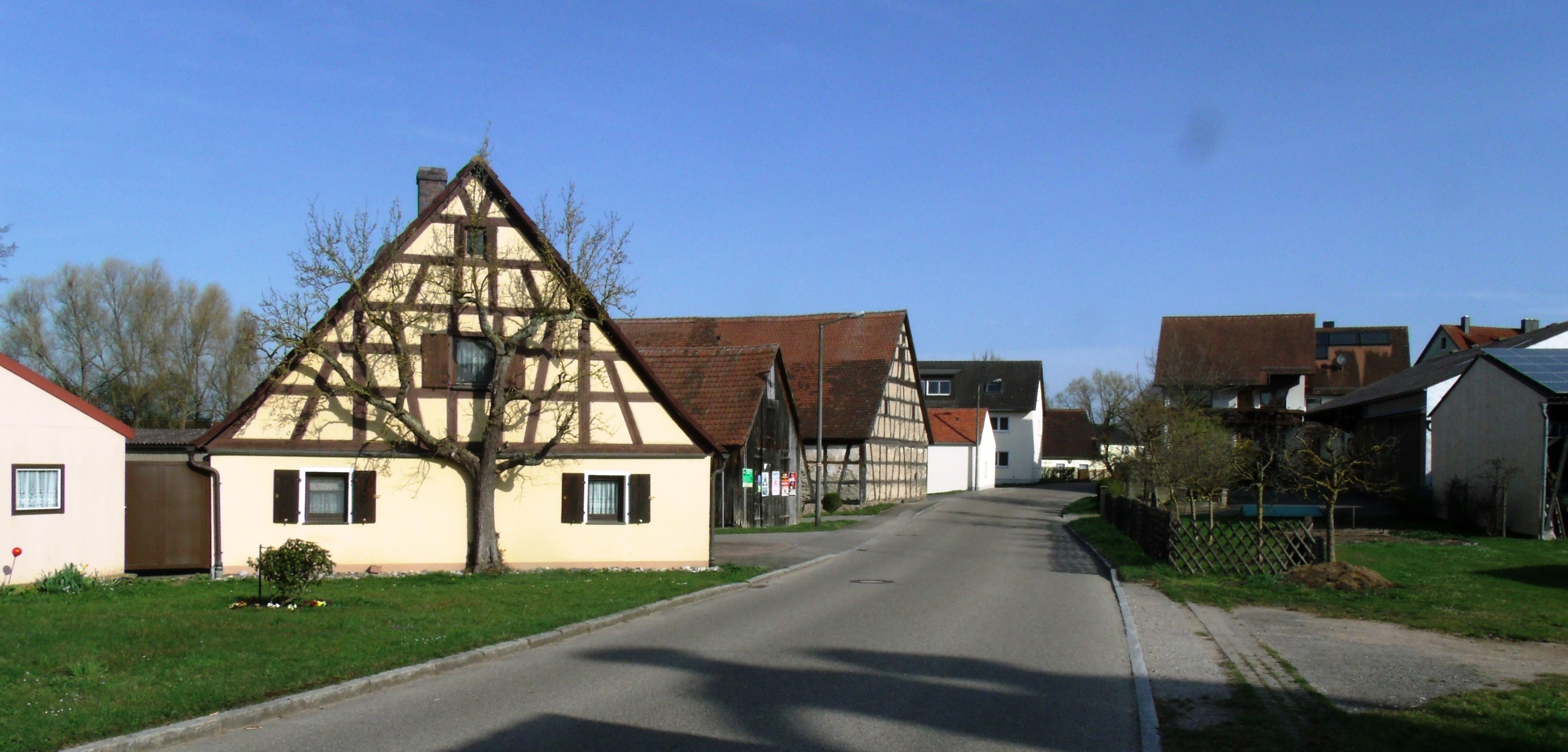 Winden, Ortsteil von Leutershausen im mittelfränkischen Landkreis Ansbach